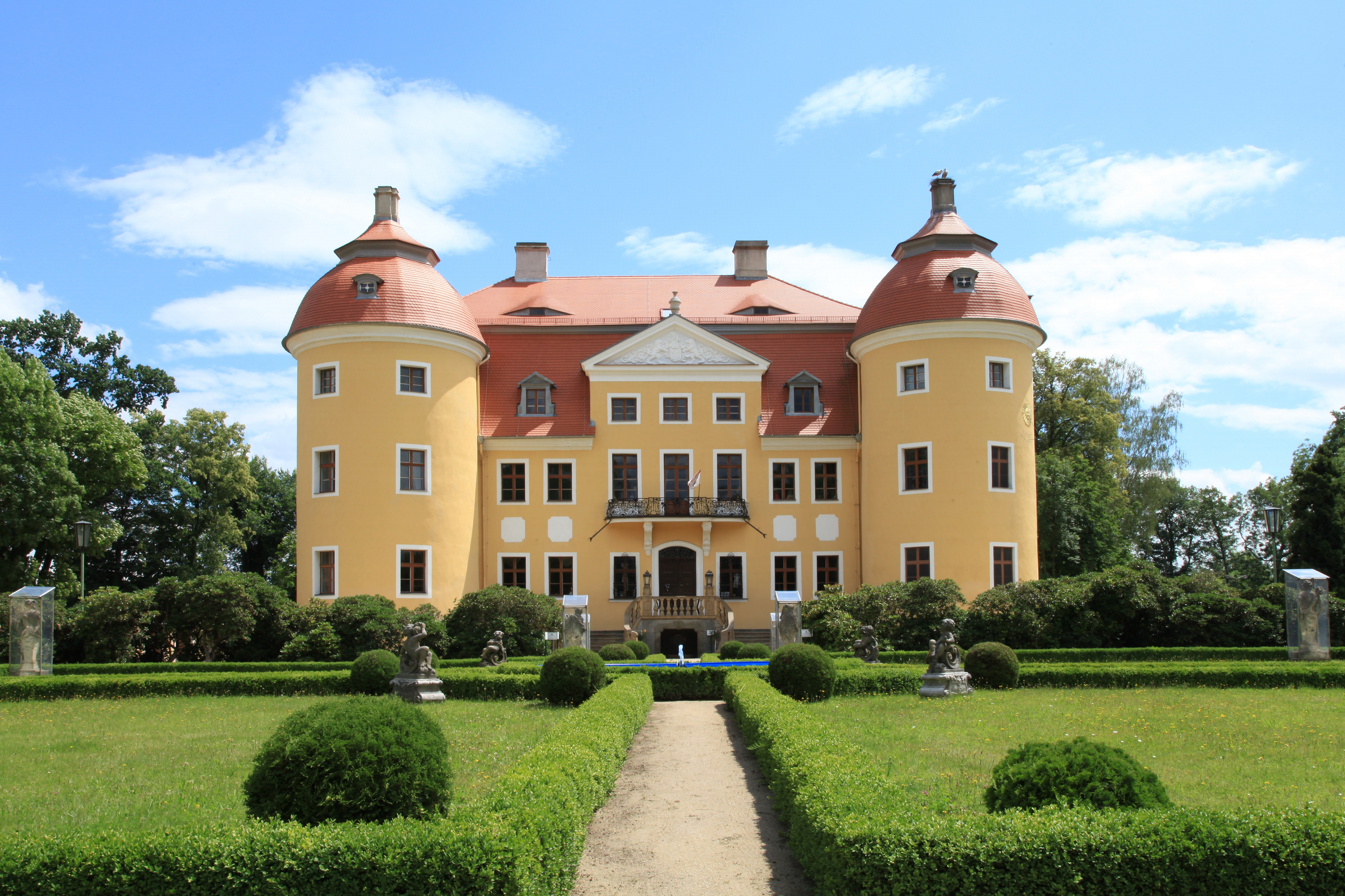 Schloss Milkel und Schlosspark in Milkel, Radibor